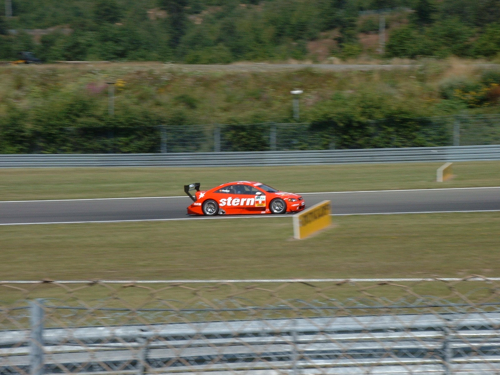 Heinz-Harald Frentzen im DTM Opel in der Saison 2004 auf dem Nürburgring.